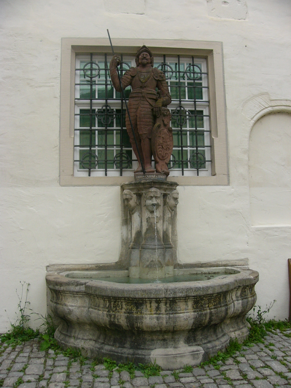 Brunnenfigur zeigt Hochmeister Johann Kaspar von Stadion, Standort: Deutschordensschloss in Bad Mergentheim